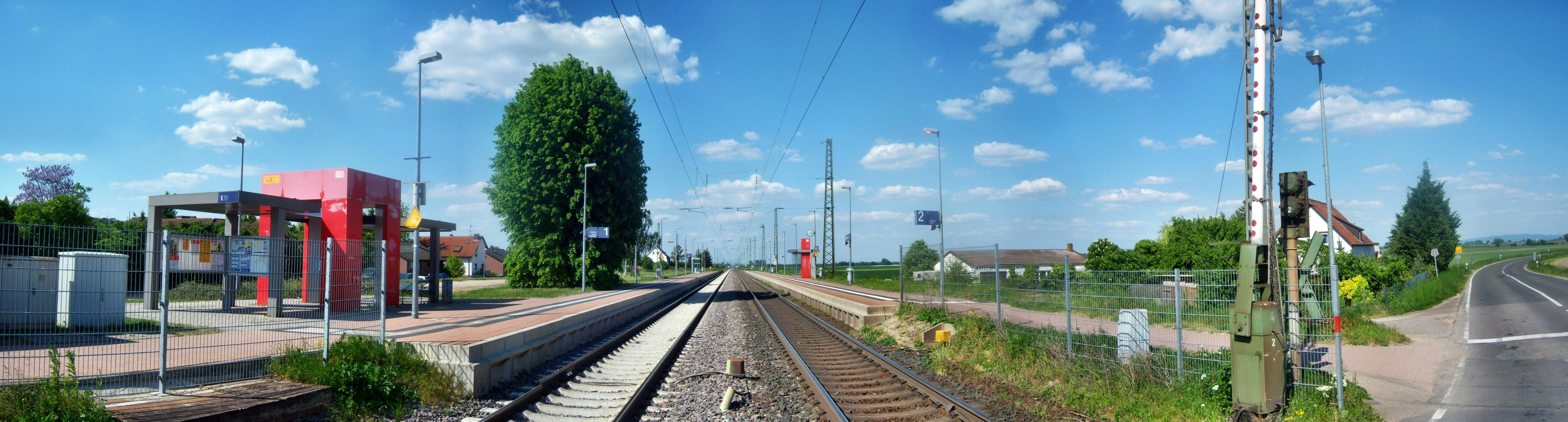 Mettenheimer Bahnhof in Rheinhessen, Blick Richtung Mainz